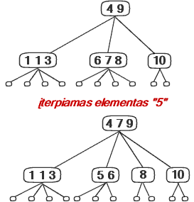 2-3-4 medis - įterpimo operacija